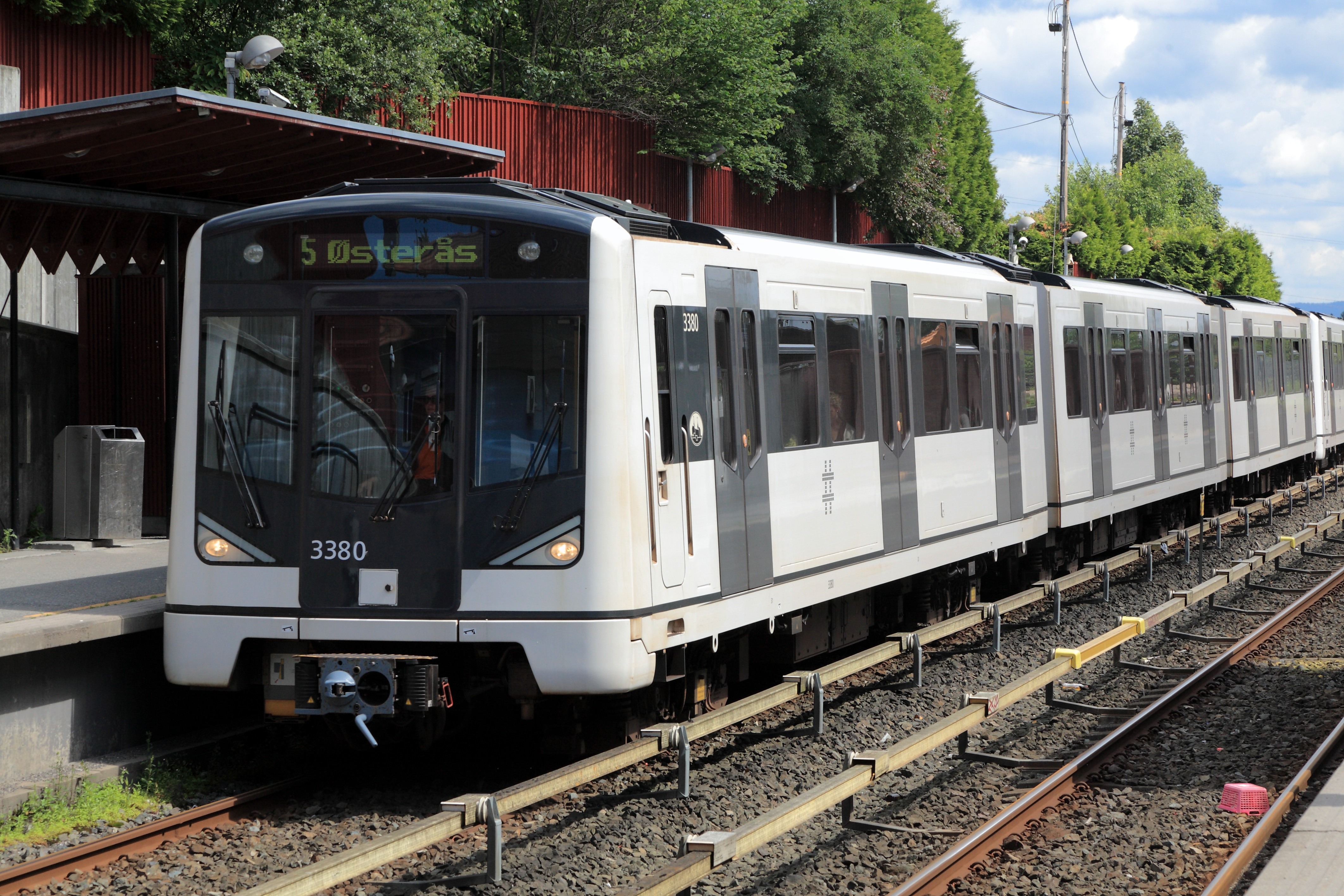 Zug der Linie 5 nach Østerås